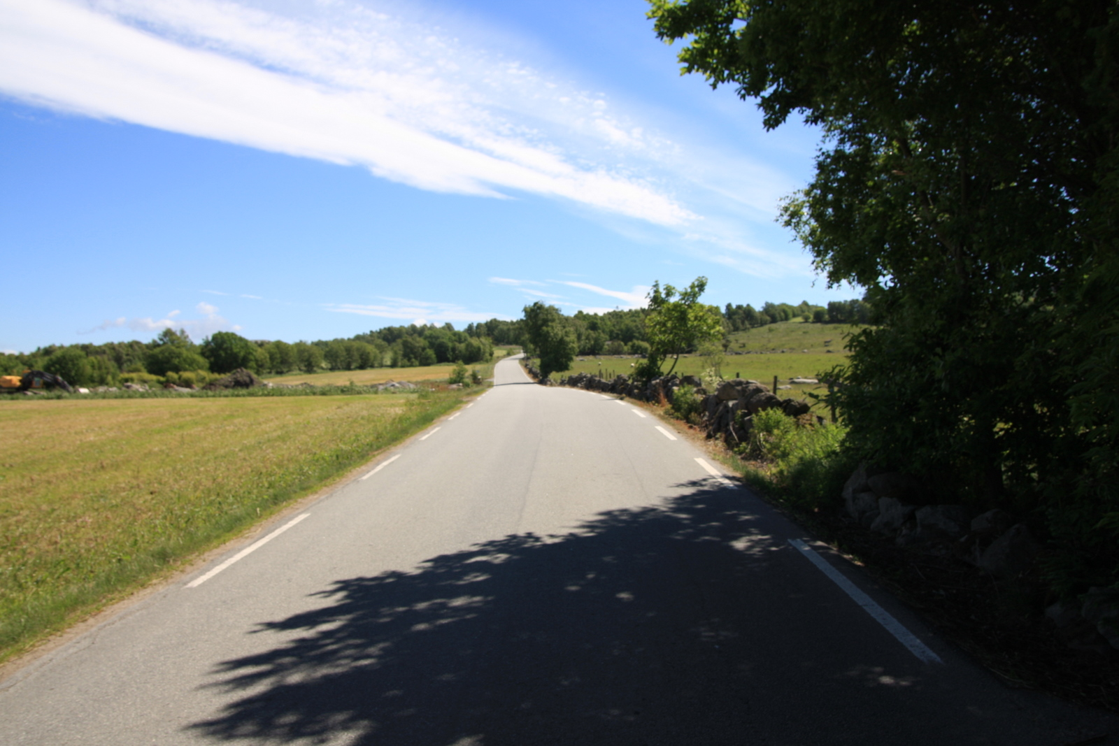 Fylkesvei 340 Jødestadveien